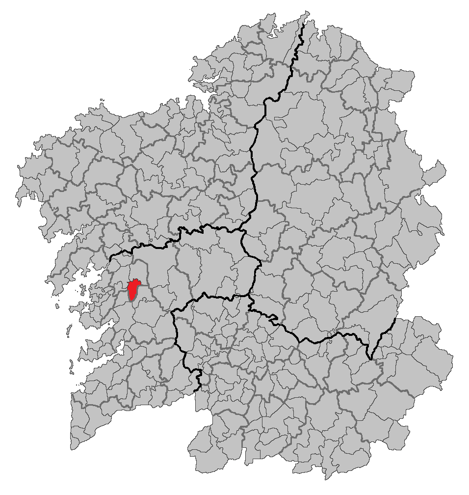 Mapa coa localización do concello de Moraña.